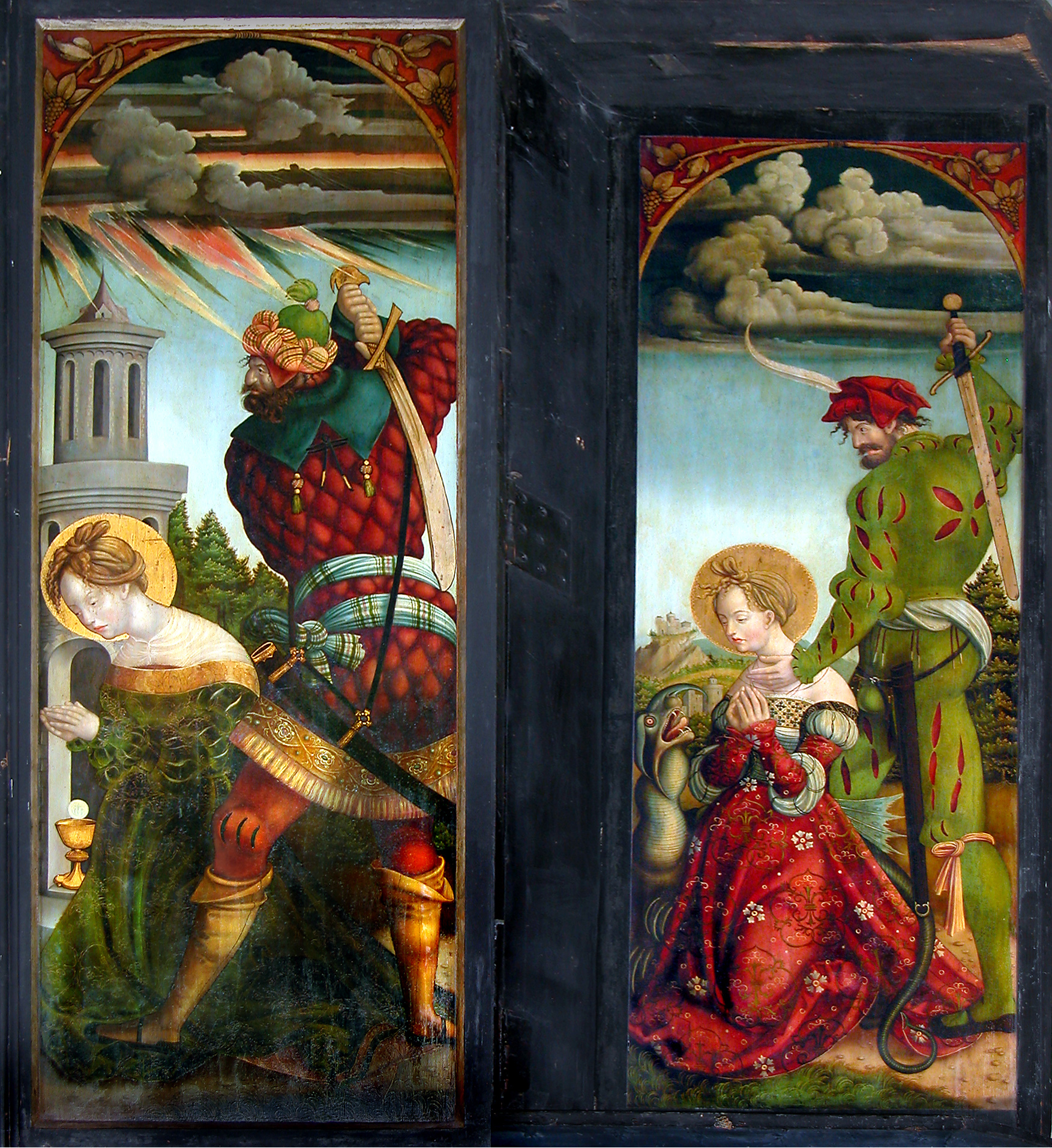 12.09.2011 09627 Oberbobritzsch (Bobritzsch-Hilbersdorf): Dorfkirche, Kirchstraße (GMP: 50.875369,13.453209). 3(6)-flügeliger Nikolausaltar von 1521 von einem unbek. Freiberger Künstler ("Bobritzscher Meister"). 2 Tafeln rechts. Linkes Gemälde: Barbara von Nikomedien (heute Izmit) hatte in der Zeit der Verfolgung im römischen Reich heimlich den christlichen Glauben angenommen. Als ihr Vater Dioskuros das bemerkte, sperrte er sie in einen Turm und schlug ihr schließlich 306 n. Chr. den Kopf ab. Rechtes Gemälde: Hinrichtung der hl. Margareta von Antiochia. Sie die Tochter eines heidnischen Priesters u. wurde von einer christlichen Amme erzogen. Als ihr Vater ihren christlichen Glauben bemerkte, denunzierte er sie. Um 305 wurde sie enthauptet, so die Legenden. [DSCNn2755.TIF]201109122335DR.JPG(c)Blobelt